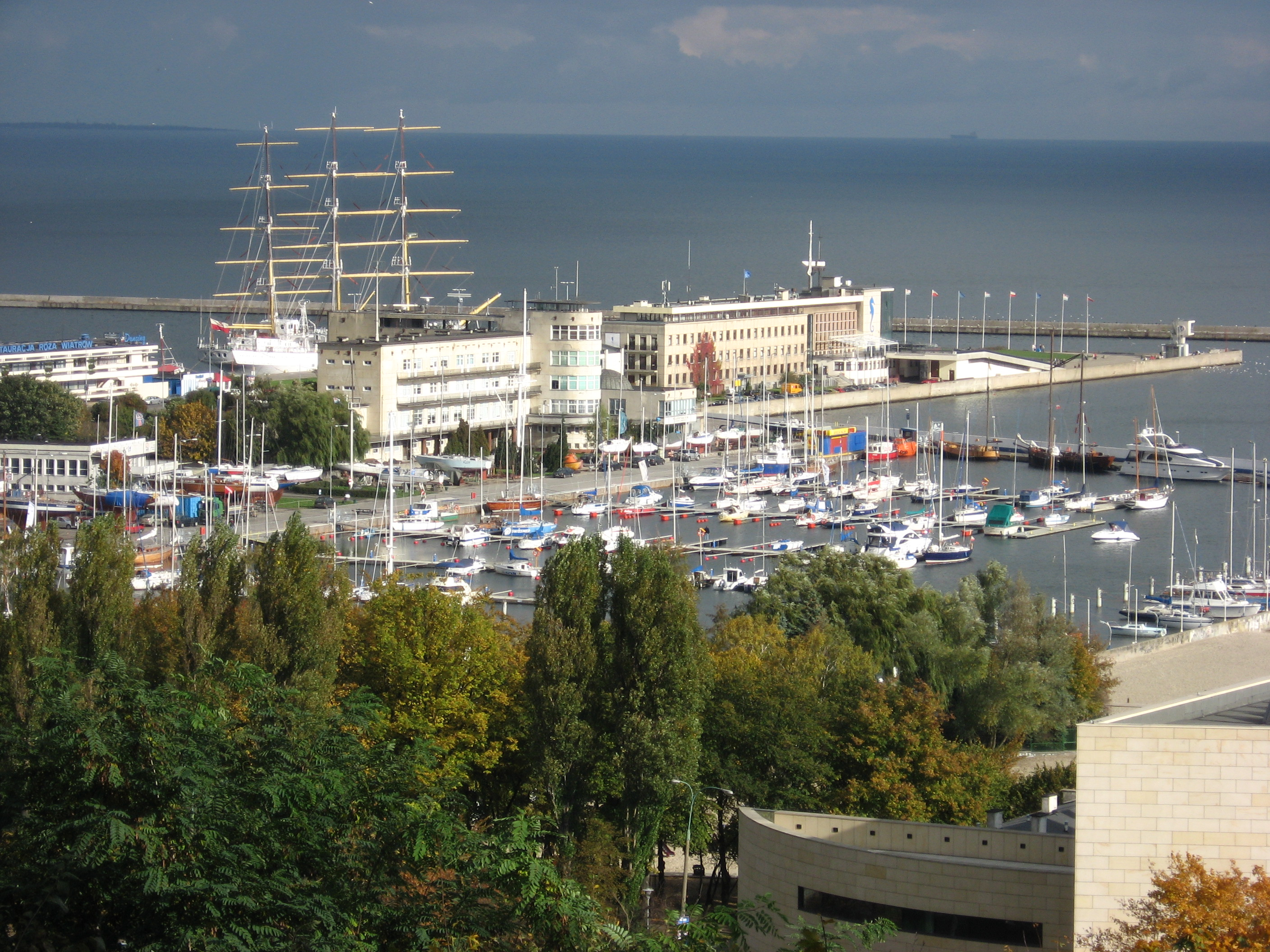 Marina w Gdyni, widok z Kamiennej Góry. W tle żaglowiec "Dar Młodzieży", budynki Akademii Morskiej oraz Oceanarium. Na horyzoncie widoczny koniec Mierzei Helskiej.